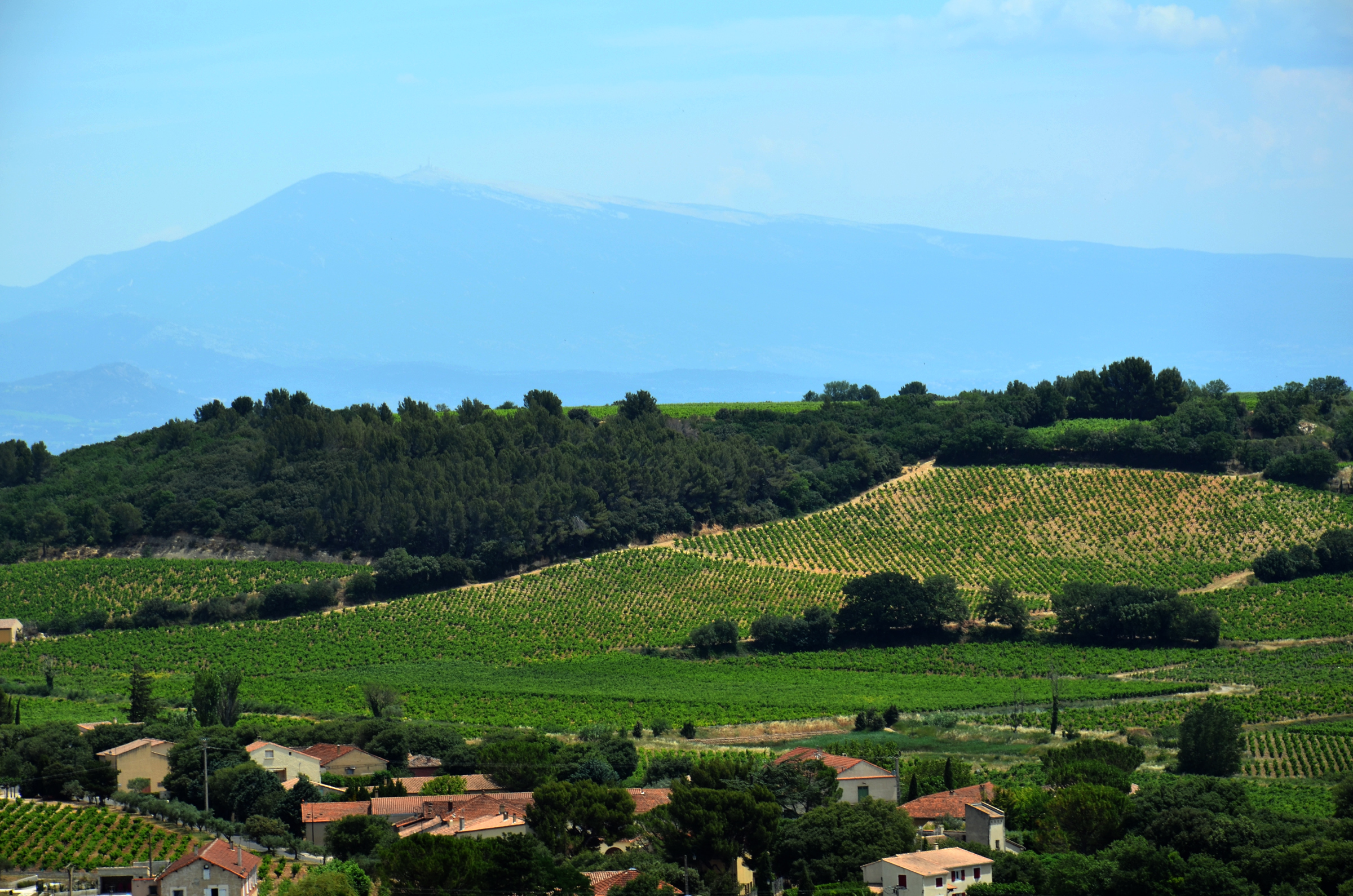 Châteauneuf-du-Pape, Blick nach Nordosten, Weinanbau, im Hintergrund der Mont Ventoux